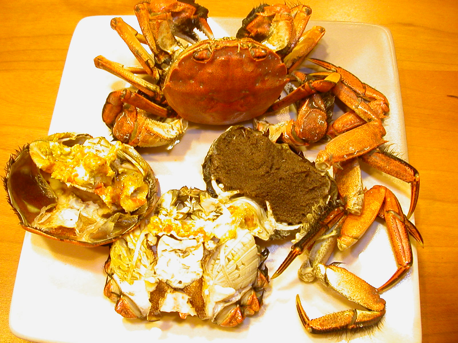 蒸したモクズガニ&紹興酒 撮影者: 投稿者に同じ 調理人: 投稿者に同じ 食べた人: 投稿者に同じ